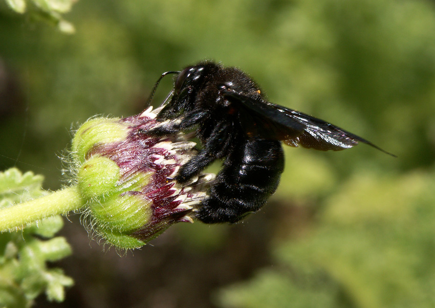 Xylocope de Darwin ou abeille charpentière. Femelle butinant un Scalesia (Asteraceae). Charles Darwin Foundation, Santa Cruz Island, Galapagos, Ecuador.